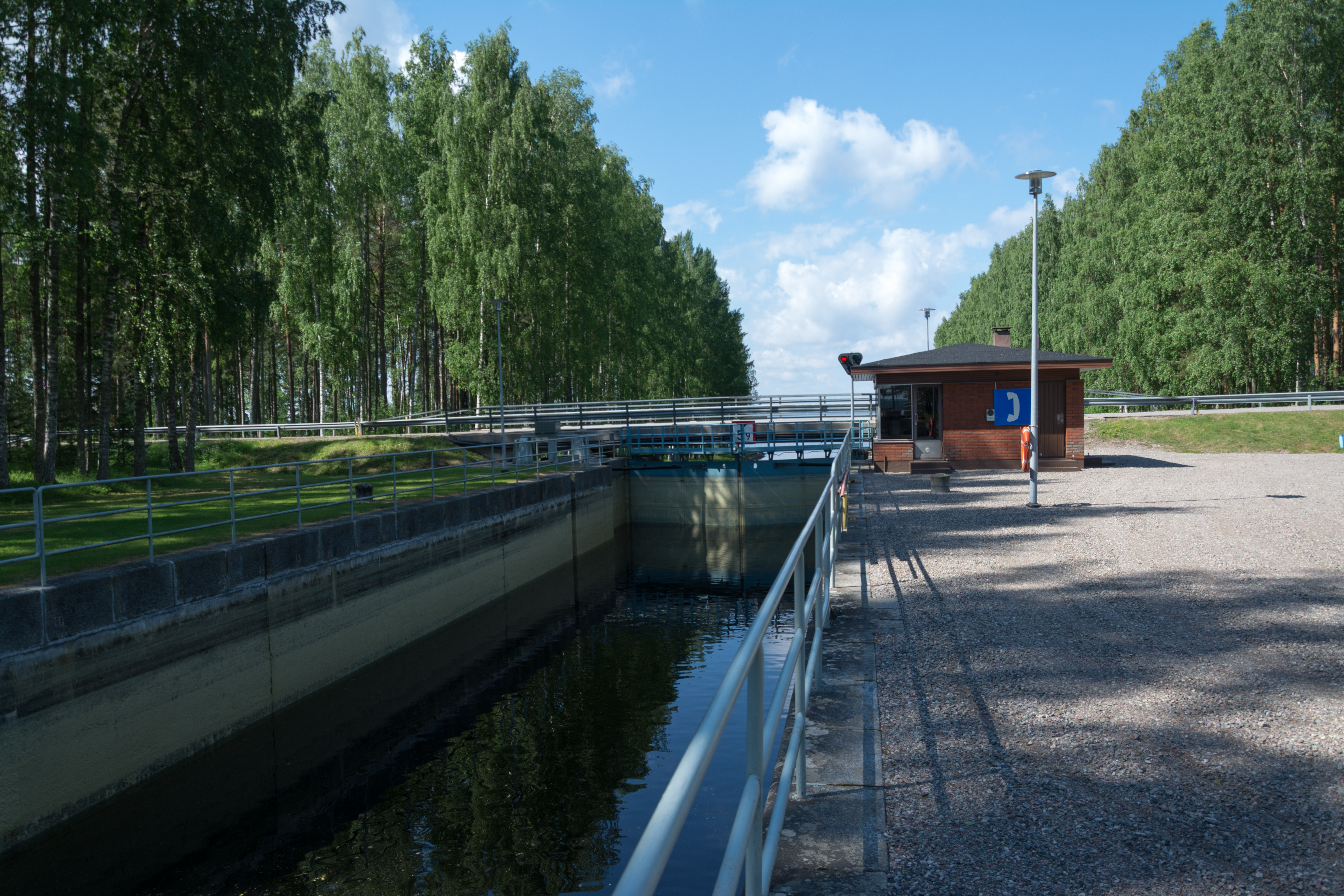 Kiesimän kanava Rautalammilla